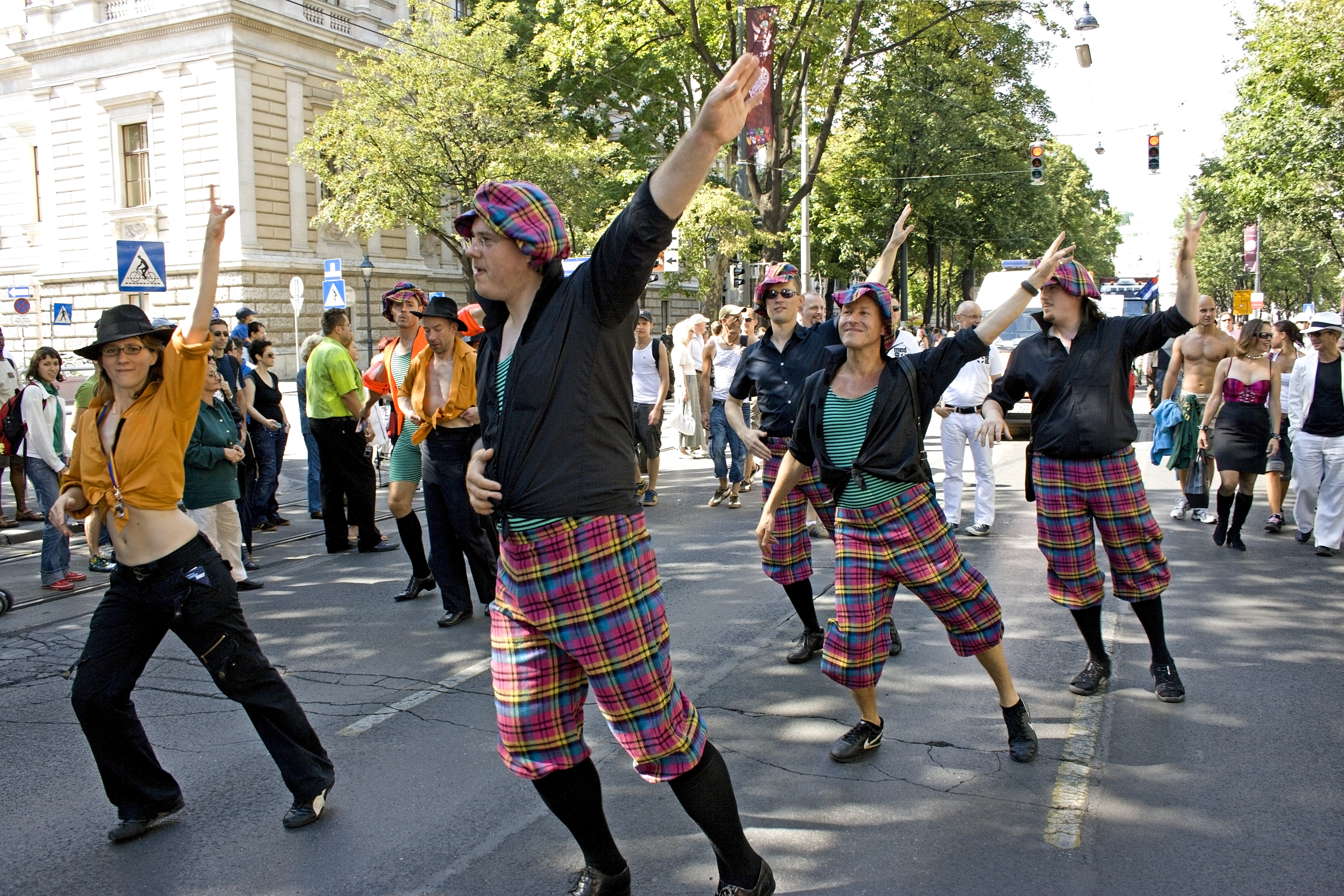 Regenbogenparade 2007, Vienna - Dancing formation „Les Schuh Schuh“